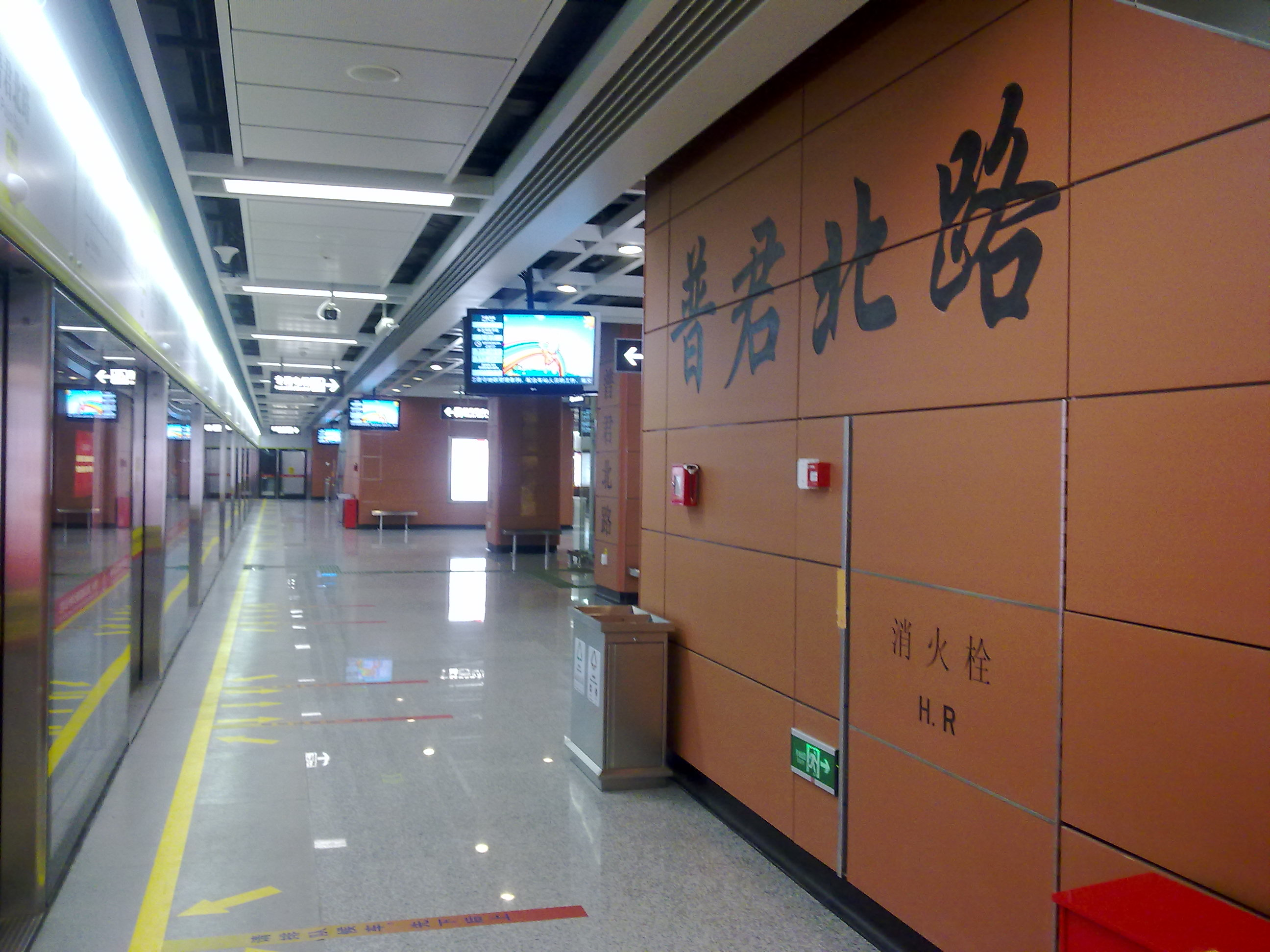 廣佛地鐵普君北路站站台